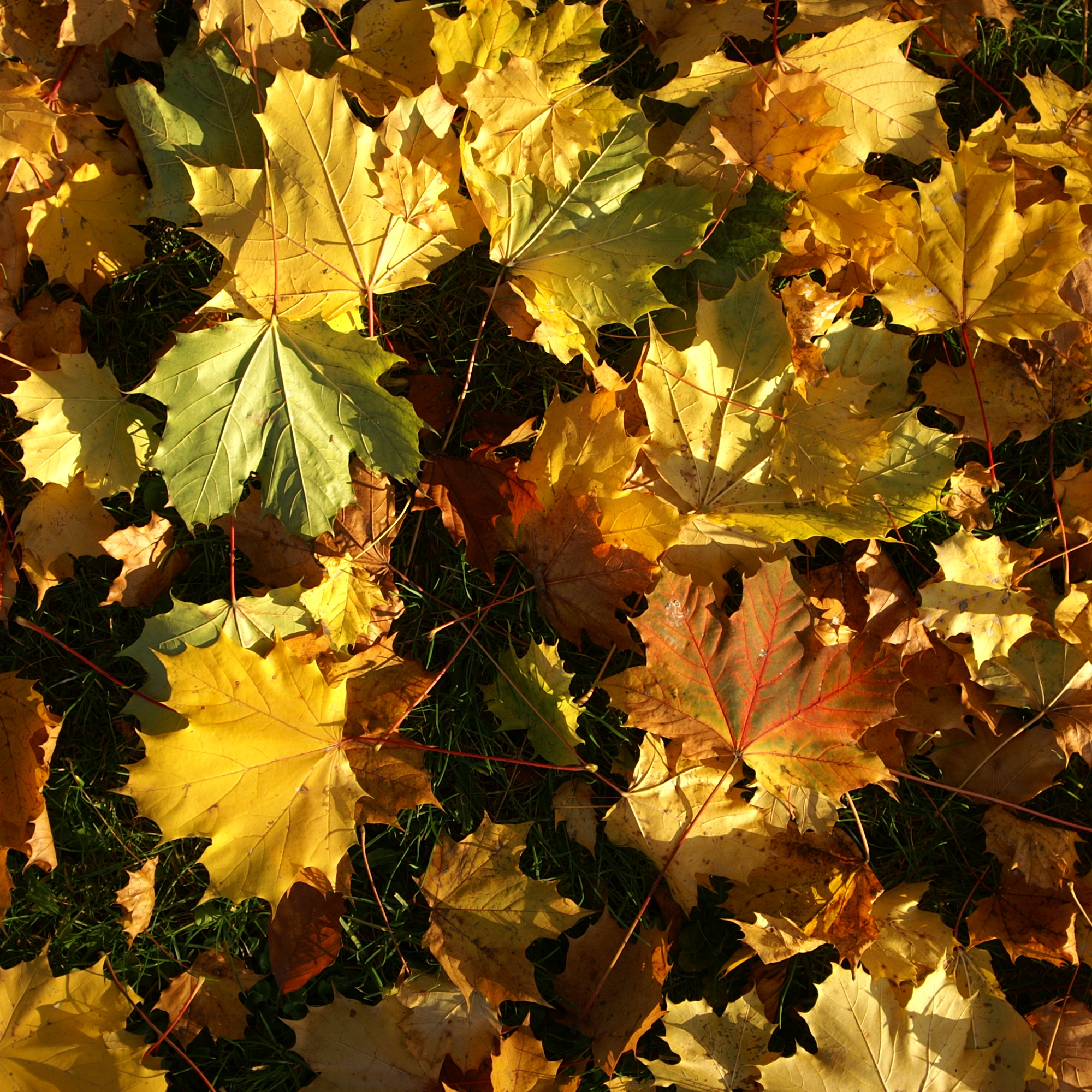 der Spitzahorn Herbst Laubblätter in Vorarlberg